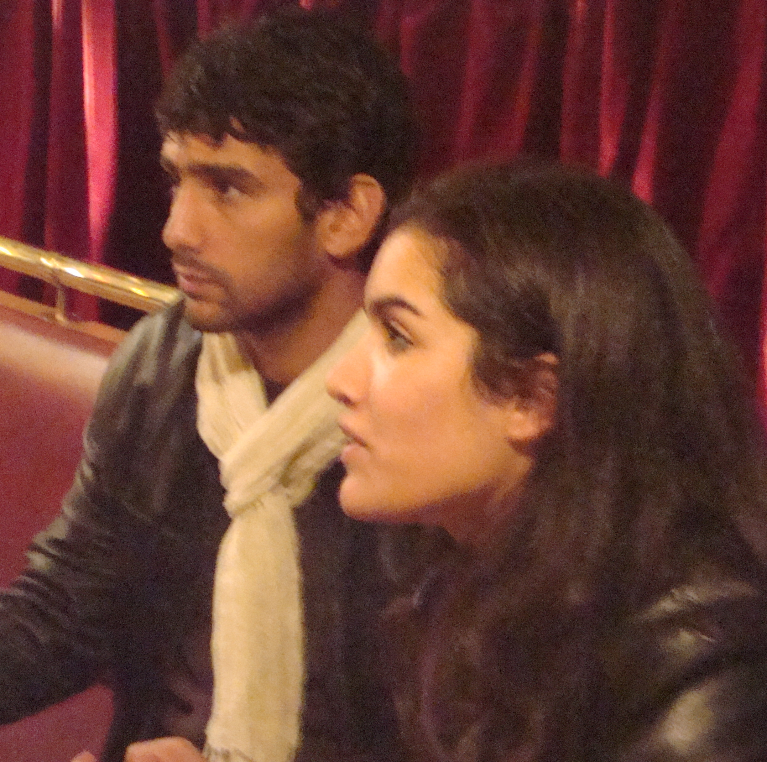 Sabrina Ouazani et Salim Kechiouche lors de l'avant-première du téléfilm "Tenir tête" à Aubervilliers.